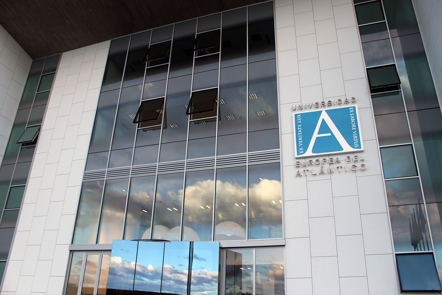 Frontis de la Universidad Europea del Atlántico (UNEATLANTICO)